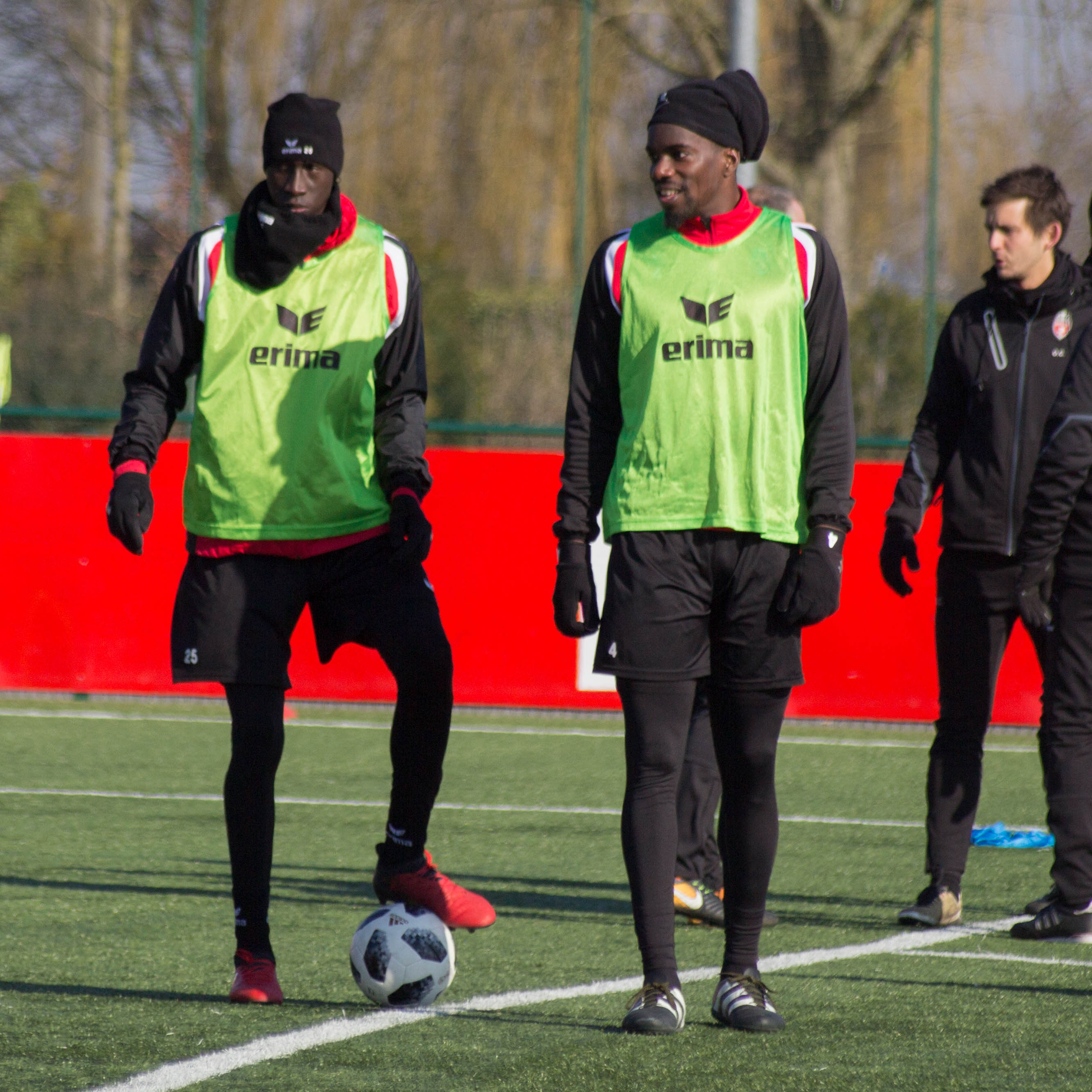 Entrainement du Royal Excel Mouscron, Futurosport, Mouscron. Le 22 Février 2018.